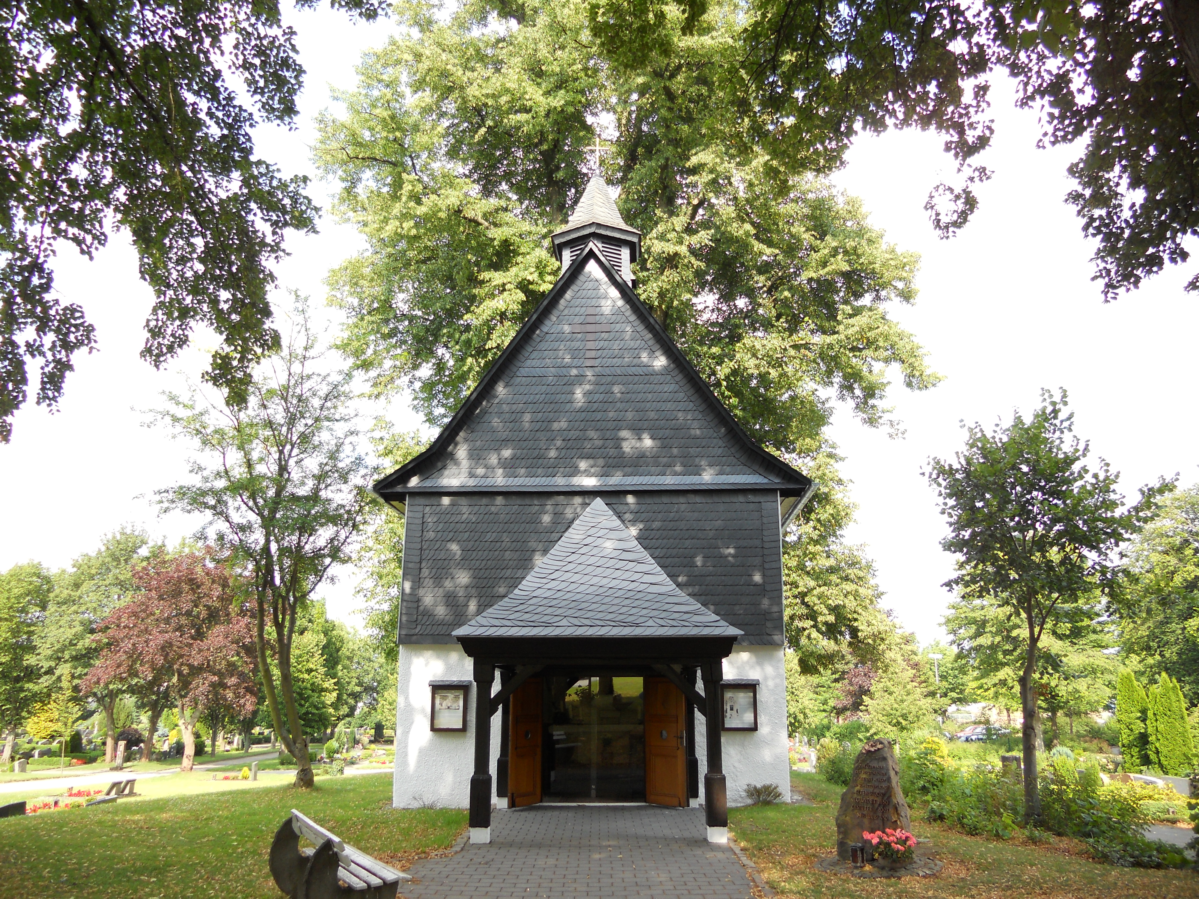 Hubertuskapelle Außenansicht